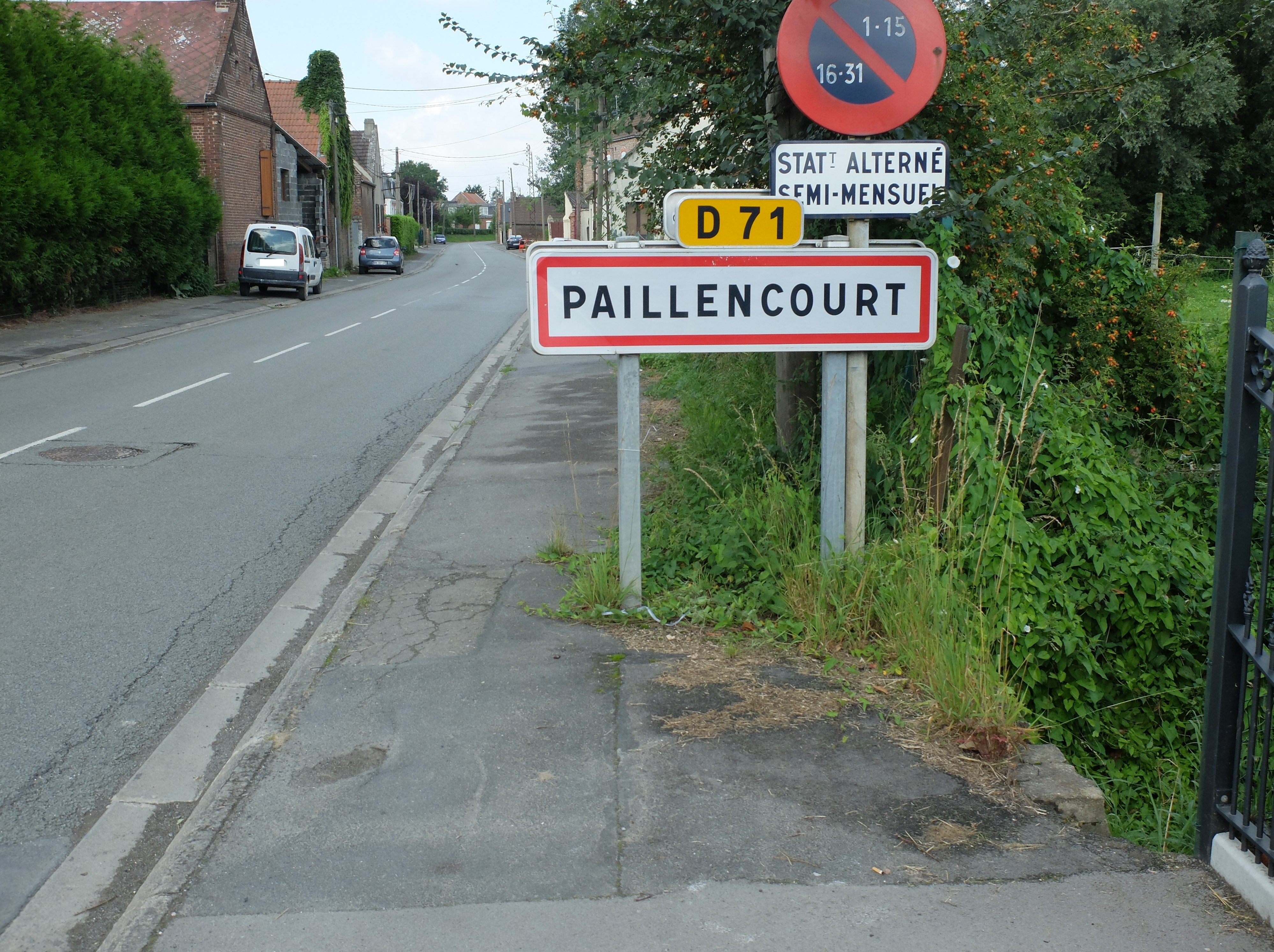 Vue d'une entrée de la commune de Paillencourt.